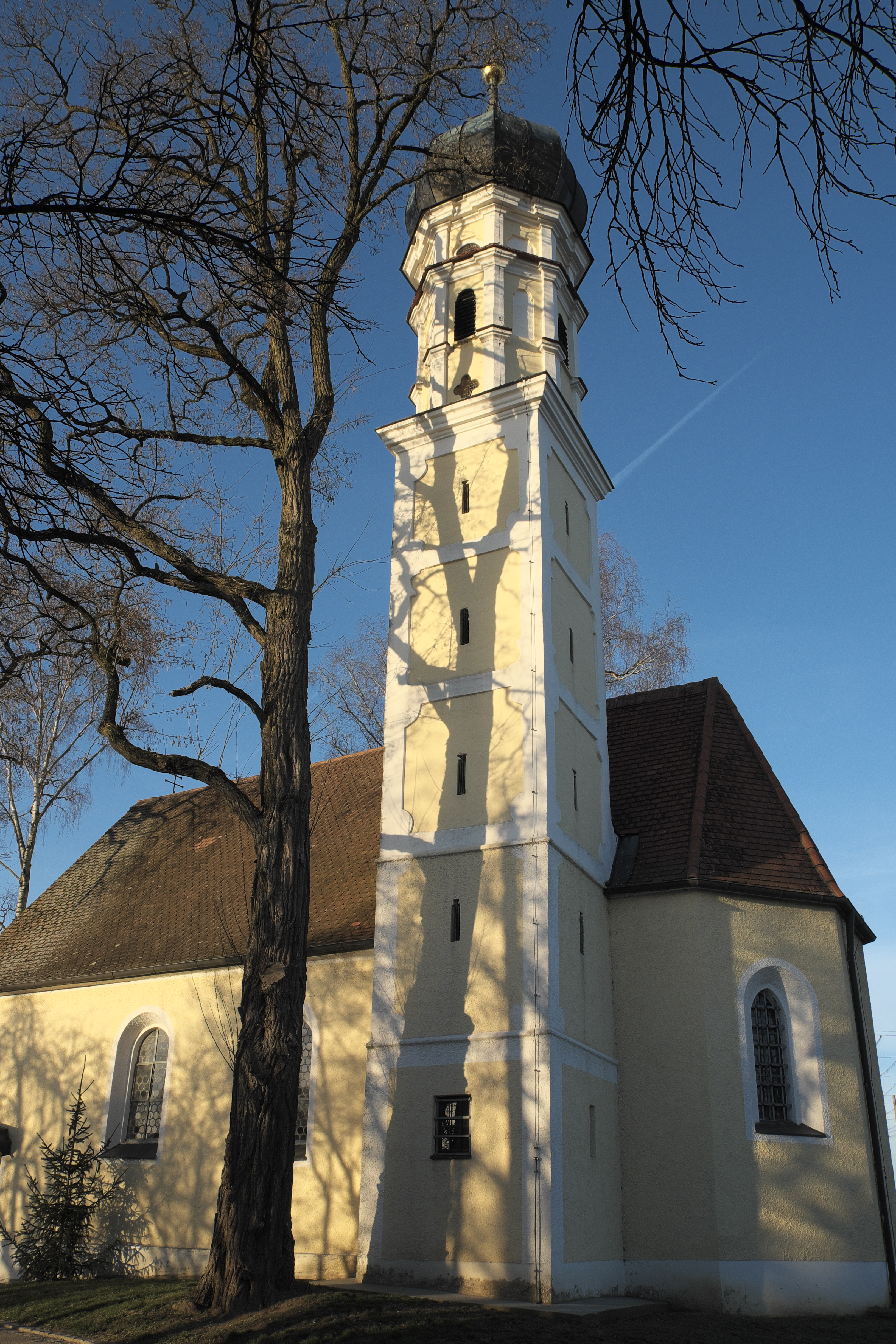 Katholische Filialkirche Sankt Leonhard in Strobenried, einem Ortsteil von Gerolsbach im Landkreis Pfaffenhofen an der Ilm (Bayern/Deutschland)